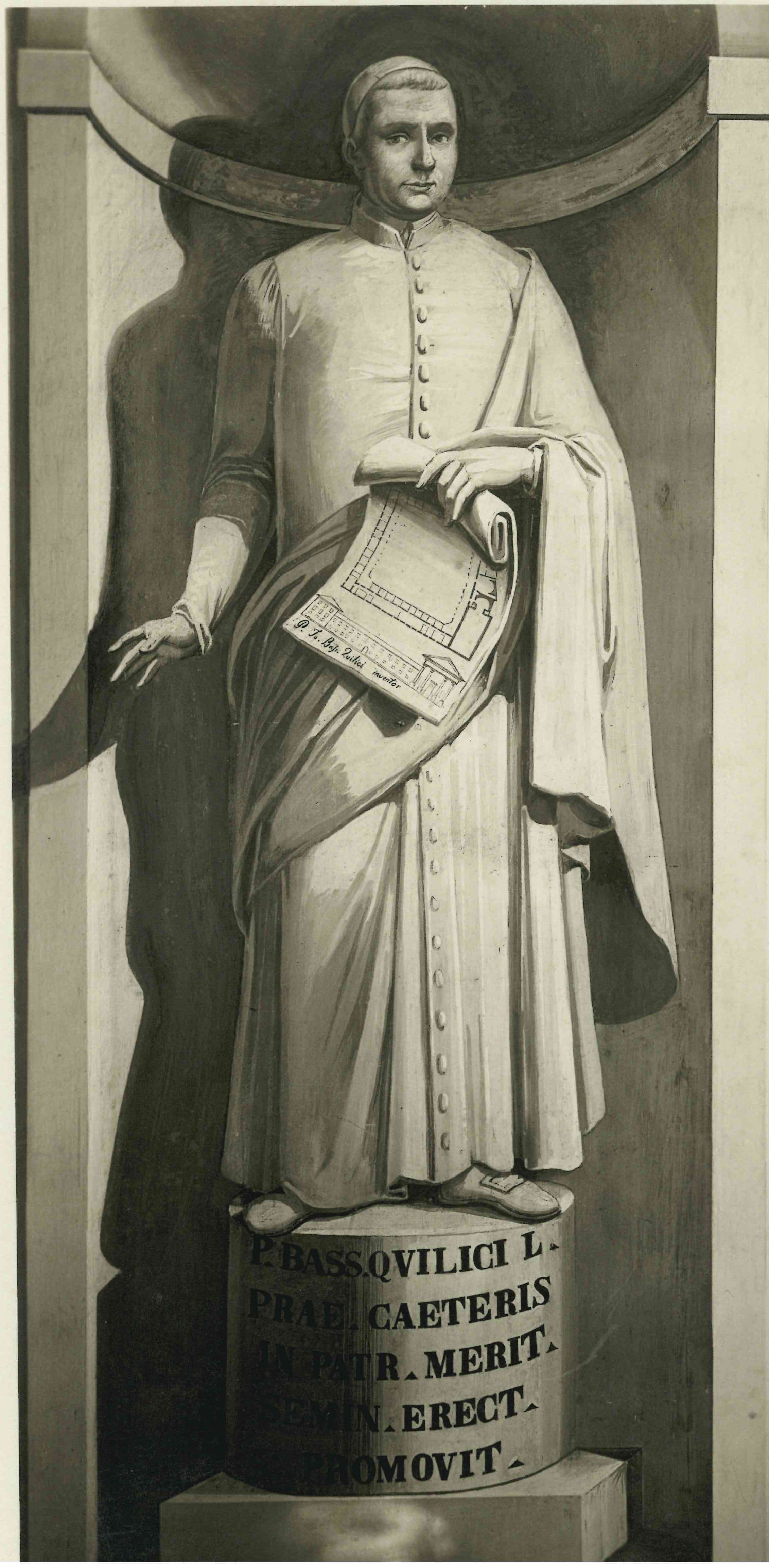 affresco che si trova a lato della cappella dell'Episcopio di Livorno